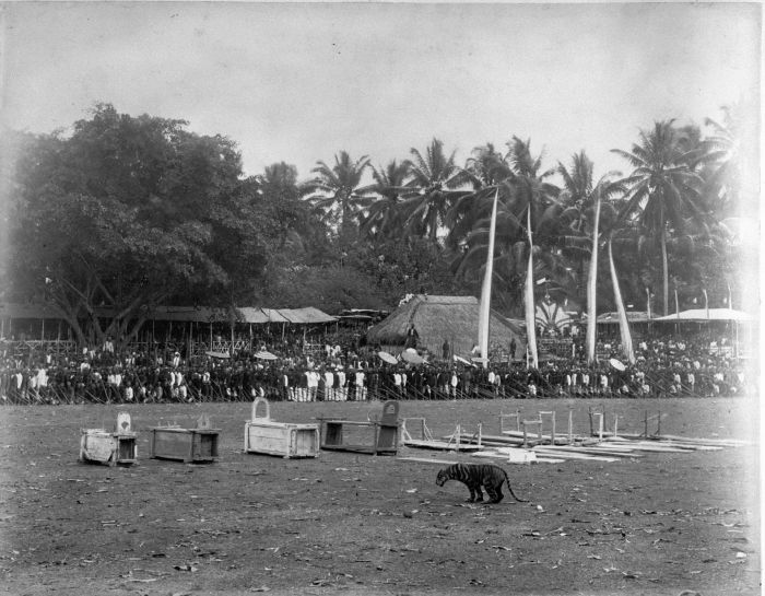 Foto. In de 19e eeuw waren er twee rituelen waar tijgers bij betrokken waren. Dat waren het tijger-buffelgevecht, waarbij de Midden-Javaanse vorsten een tijger en een waterbuffel (karbouw) tegen elkaar lieten vechten, wat meestal door de karbouw werd gewonnen, en de tijgerstekerij of tijgerrampok. Bij dat laatste ritueel, dat ook door Regenten georganiseerd werd, sloot men een aantal tijgers en luipaarden in een soort kisten op om ze vervolgens op een groot veld neer te zetten omgeven door een carré van Javanen met pieken bewapend, drie rijen dik. Dan werd de tijger uit zijn kist gejaagd, waarna hij verwoede pogingen deed te ontsnappen, daarbij iedere keer op een muur van pieken stotend. In verreweg de meeste gevallen stierf de tijger aan de wonden die hij op die manier opliep, maar een enkele keer sprong hij over de rijen piekdragers heen en ontsnapte.. Een tijgergevecht